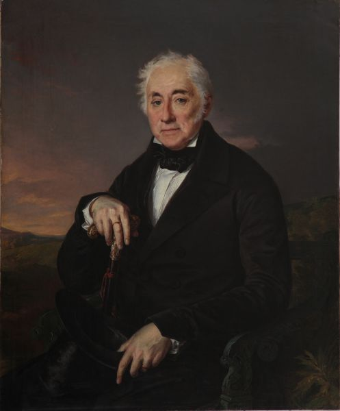 Алексей Васильевич Васильчиков (09.09.1776—18.04.1854), сенатор.